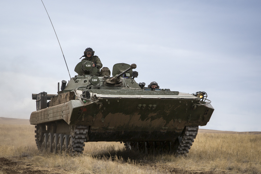 БМП-2.